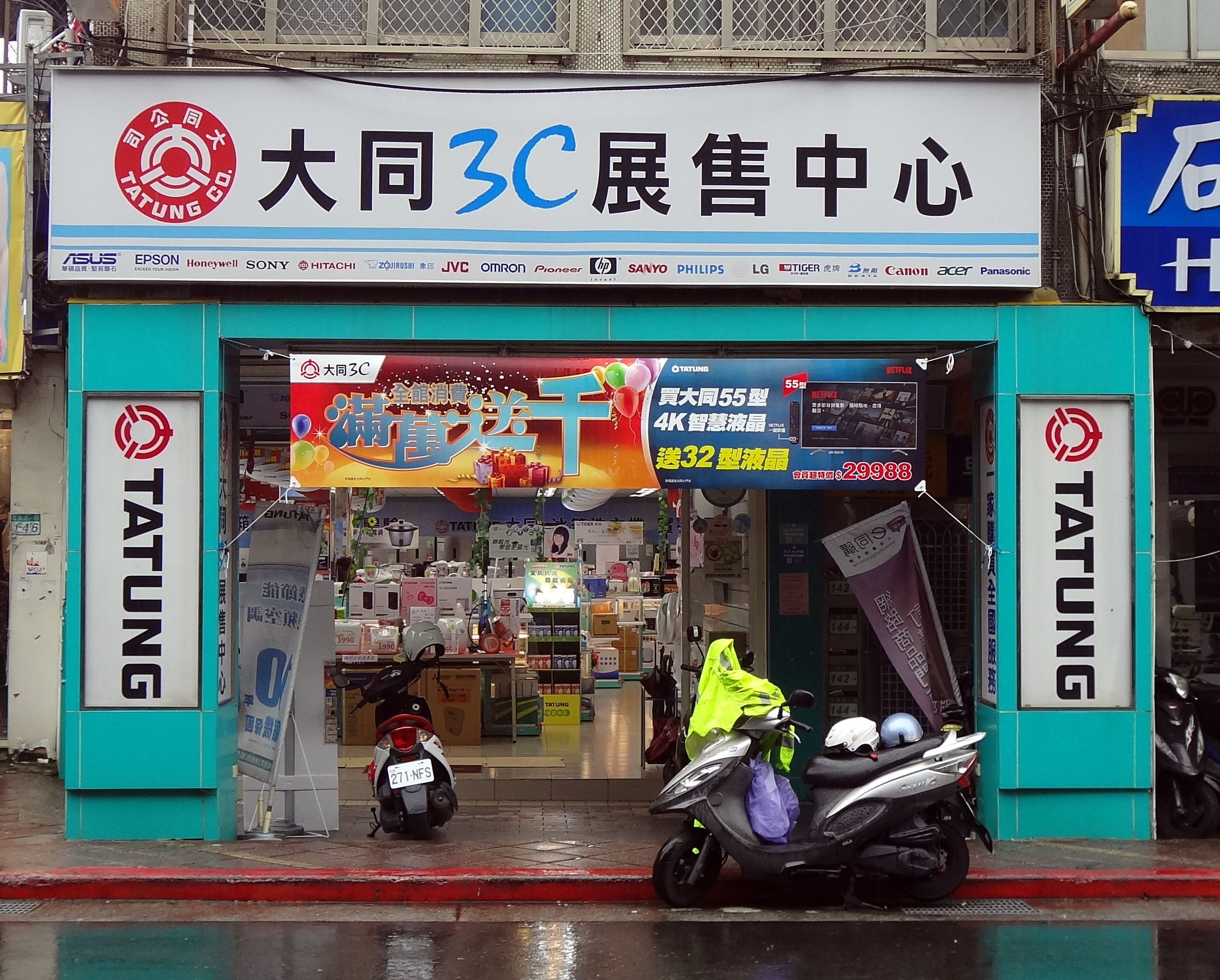 大同3C展售中心台北石牌門市，位於臺北市北投區石牌路一段144號1樓。